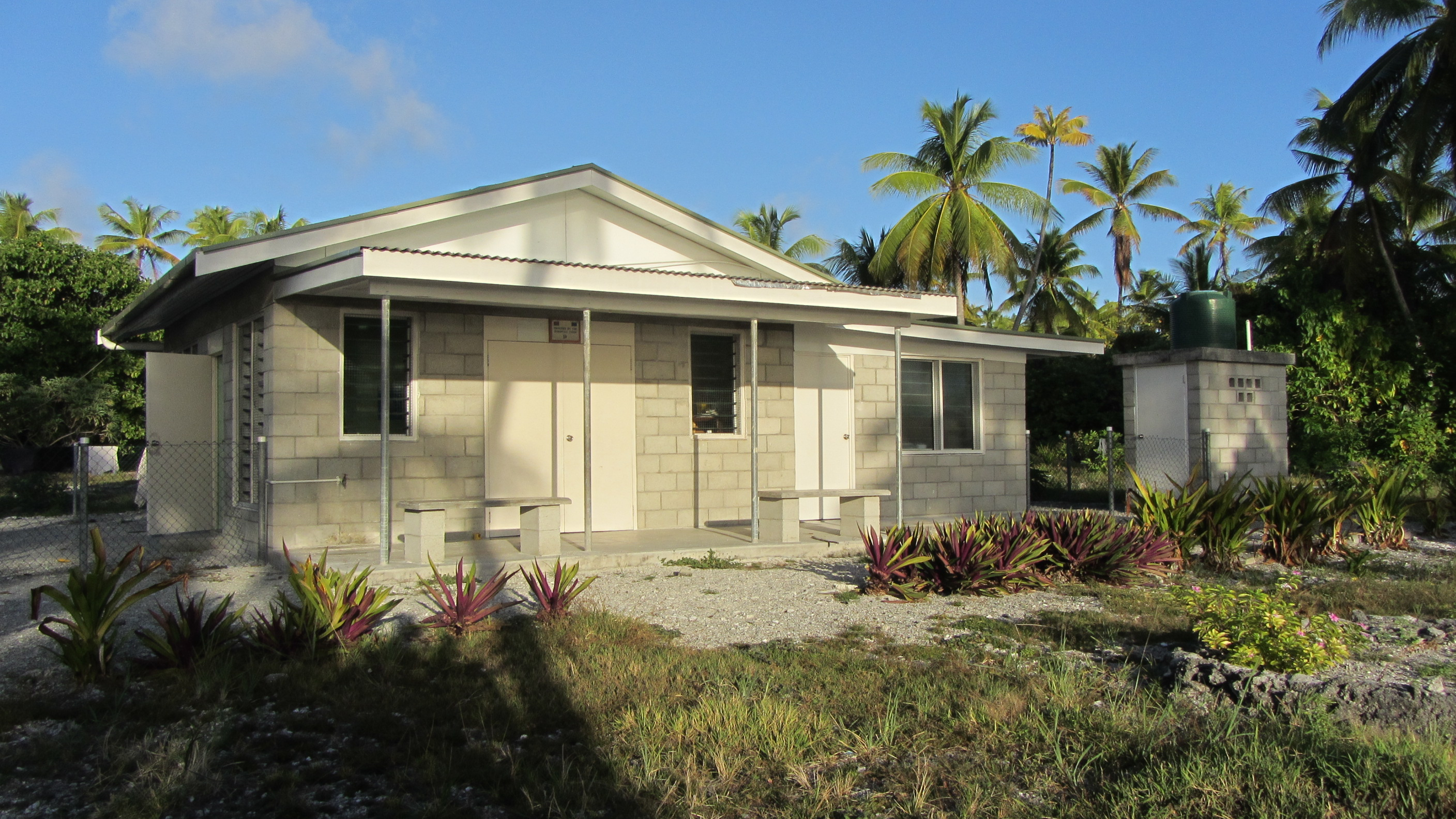 Medizinische Verrsorgungsstation auf Abaigang, Kiribati